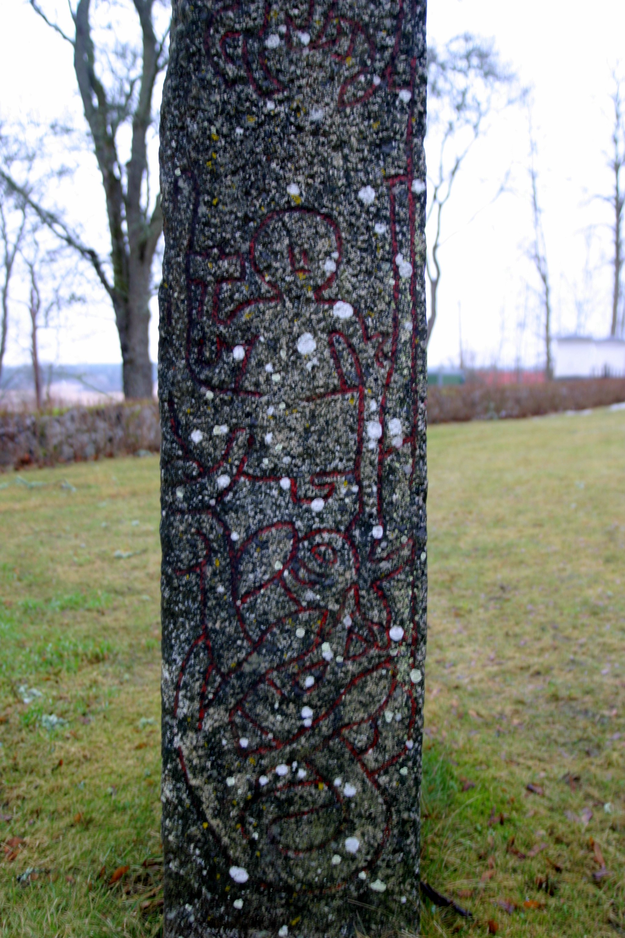 Upplands runinskrifter 1161, Altunastenen. (se även Image:Altuna U1161 andra sidorna 20050205.jpg)